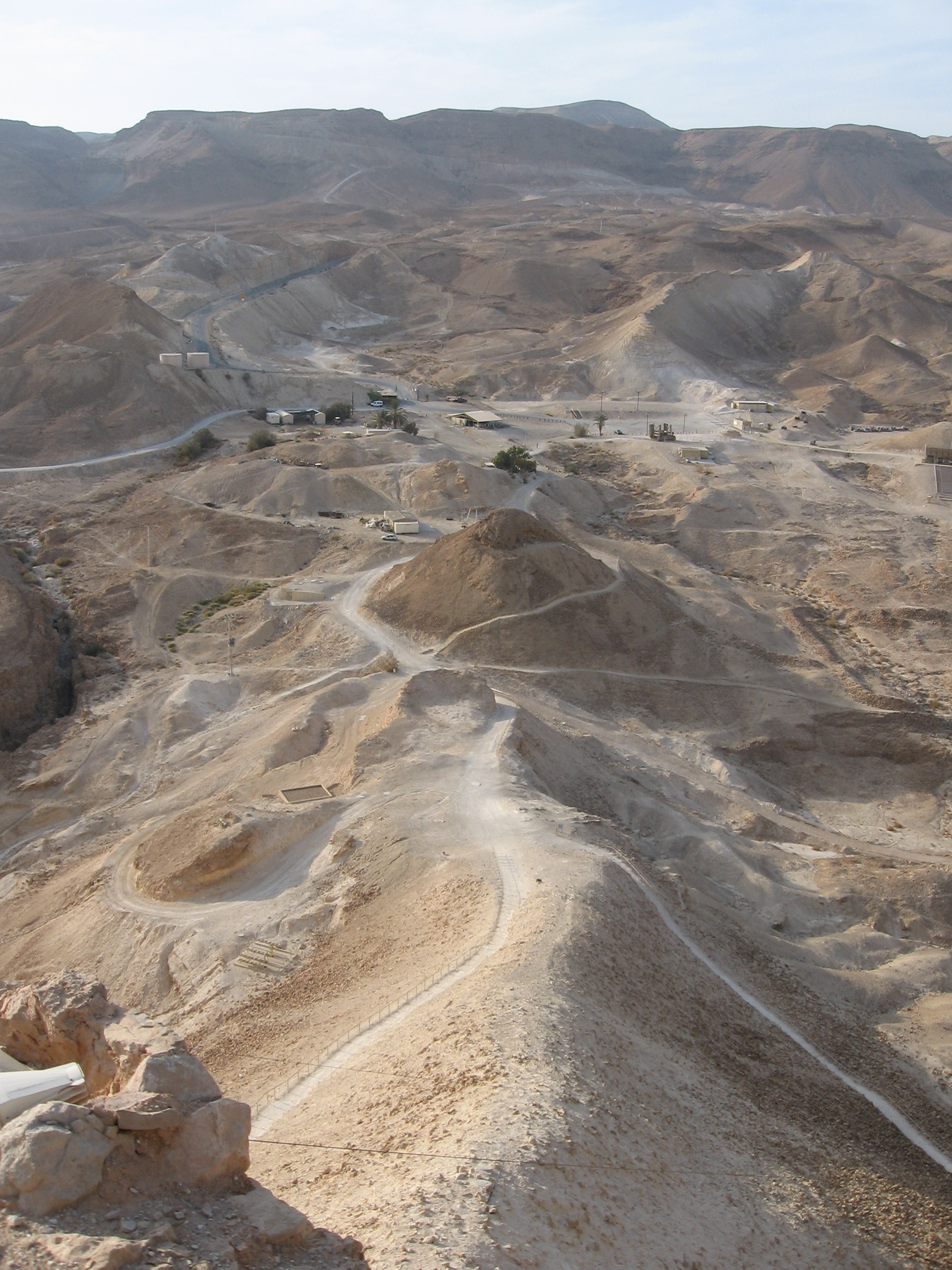 Die von den Römern angelegte Rampe in Masada